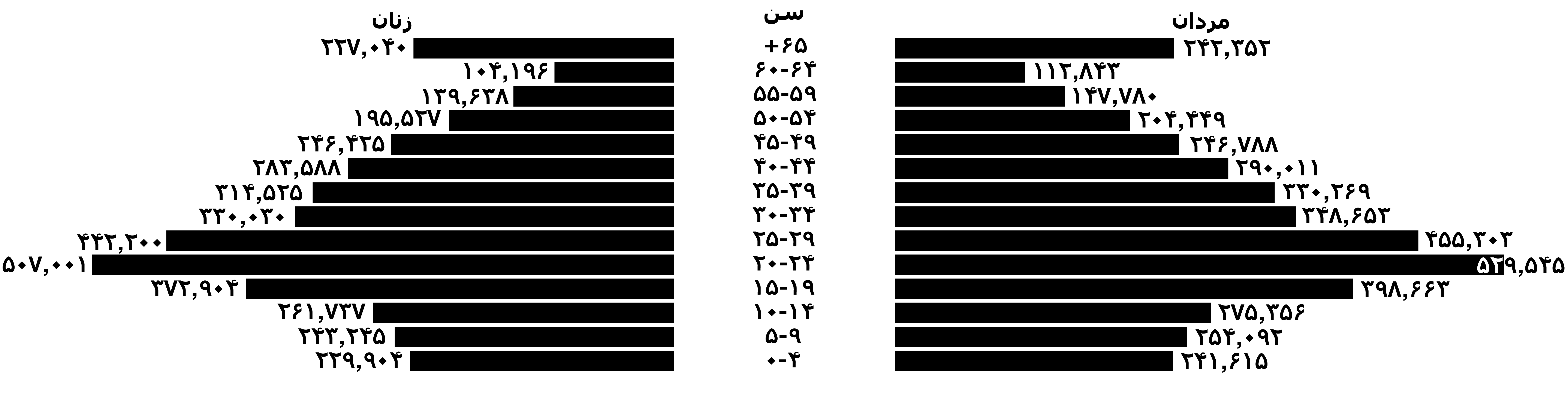 هرم جمعیتی تهران در سال ۱۳۸۵